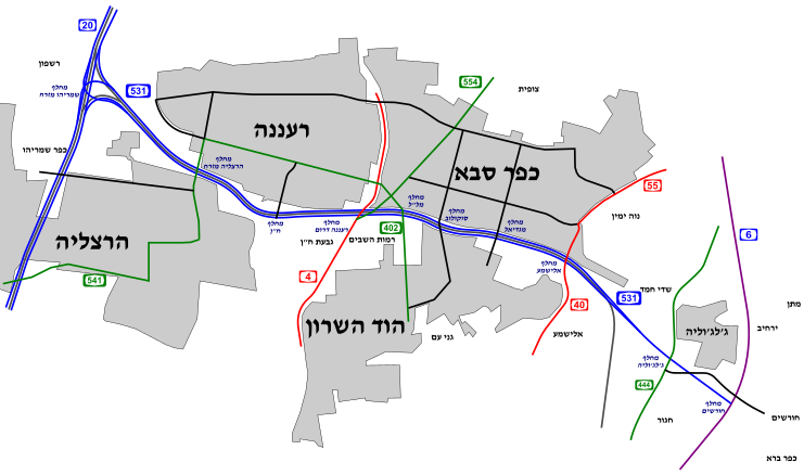 תרשים הכביש ונקודות מרכזיות בהן הוא עובר בסמוך ומספרי הכבישים